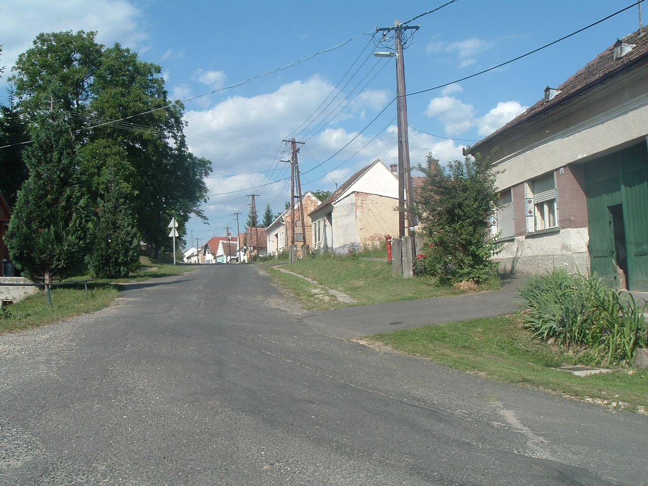 Ólmod, Hungary